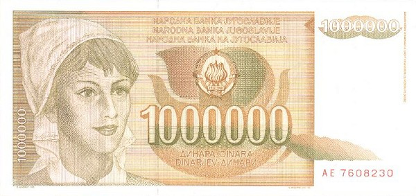 1 Million Yugoslav dinars note (1989)